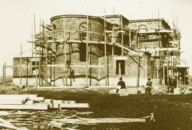 Kryg - rzymskokatolicki kościół parafialny pw. NMP Królowej Polski (zdjęcie z lat 1932-1934)